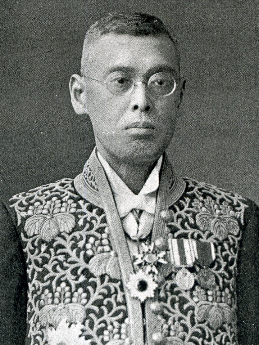 この写真は、高橋光威（1868-1932）の写真です。